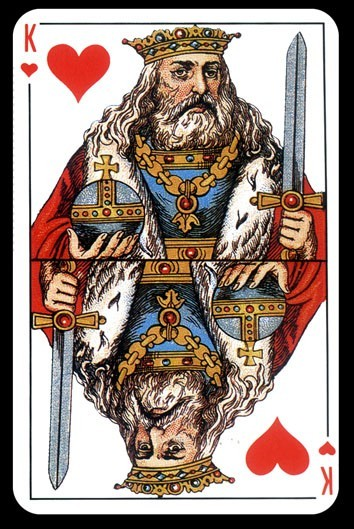 Атласная колода экстра король черви